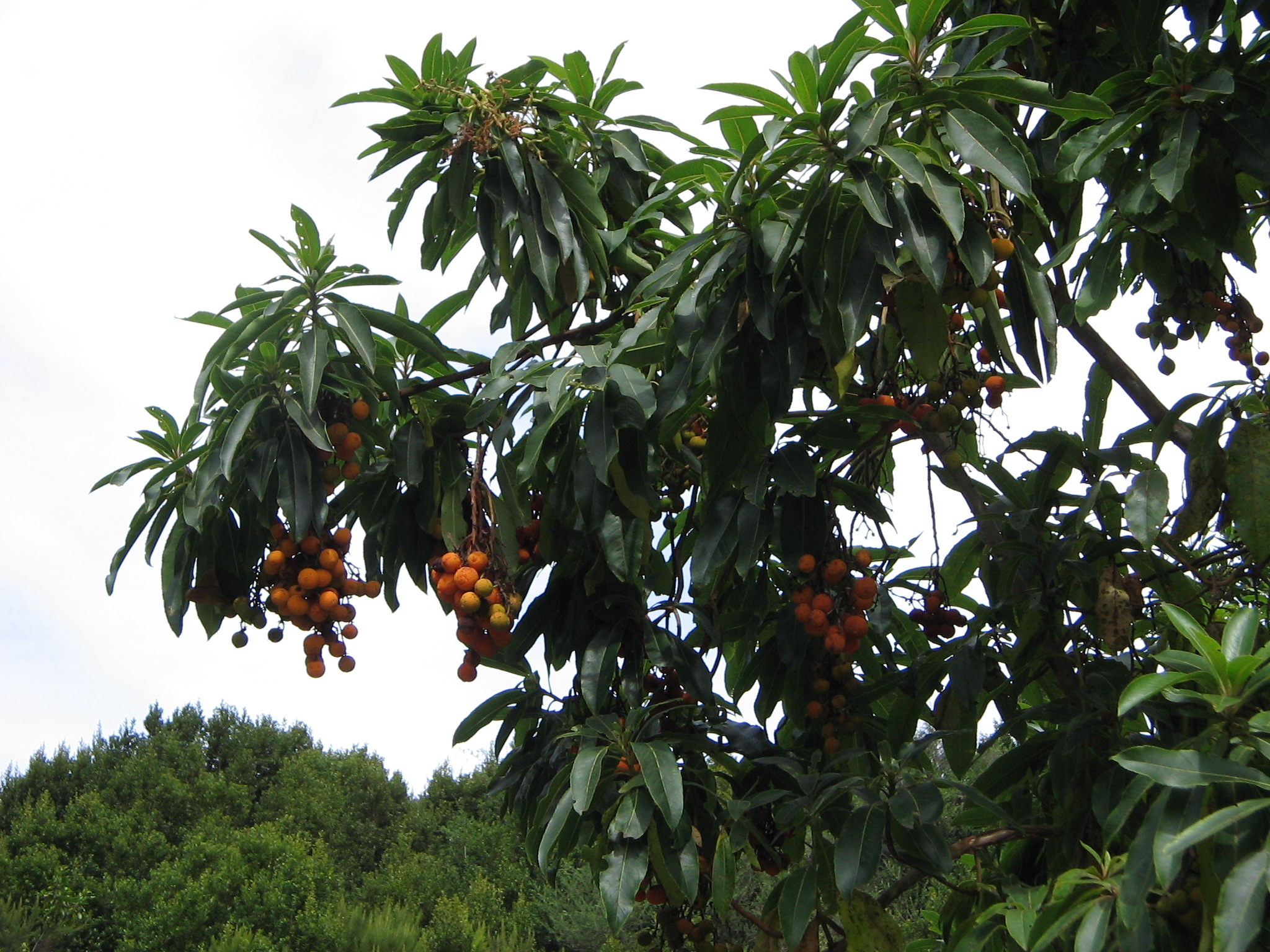 Détail des fruits de Arbutus canariensis